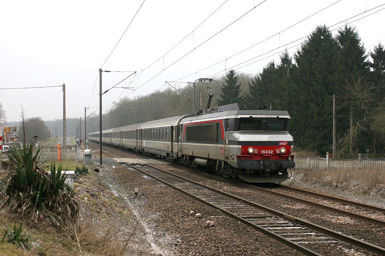 BB 15032 - 2010-02-09 - Sassegnies